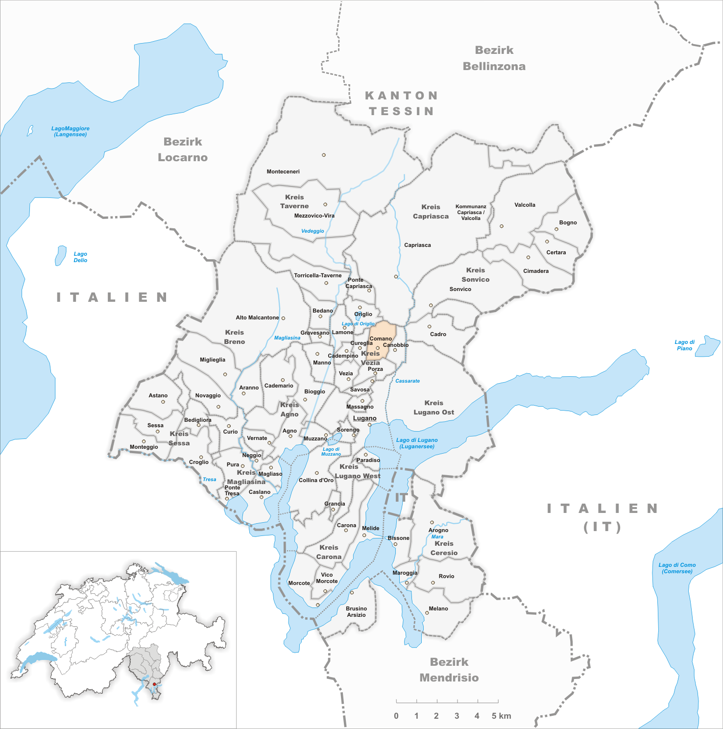 Municipality Comano